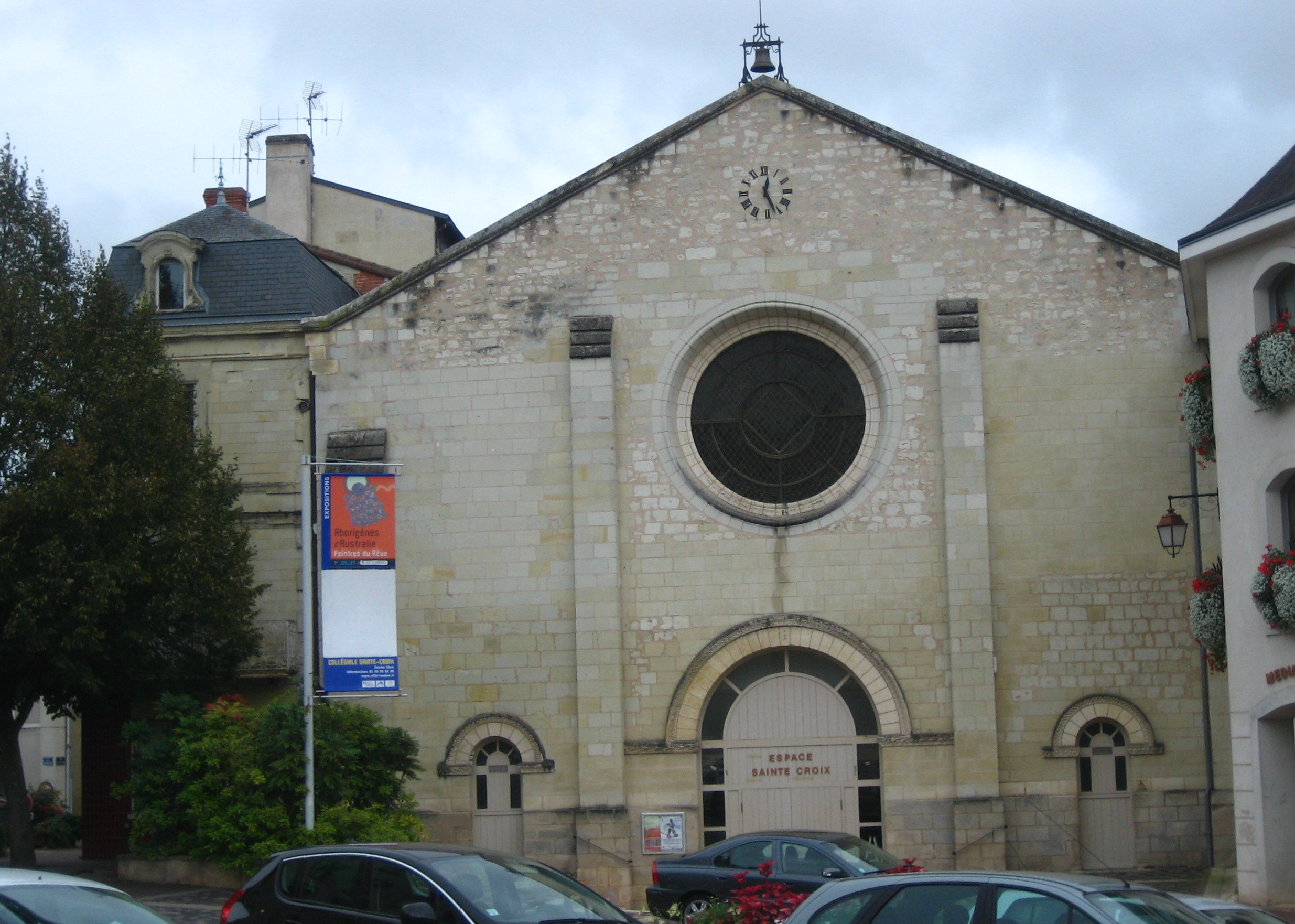 Église Sainte-Croix de Loudun, façade.